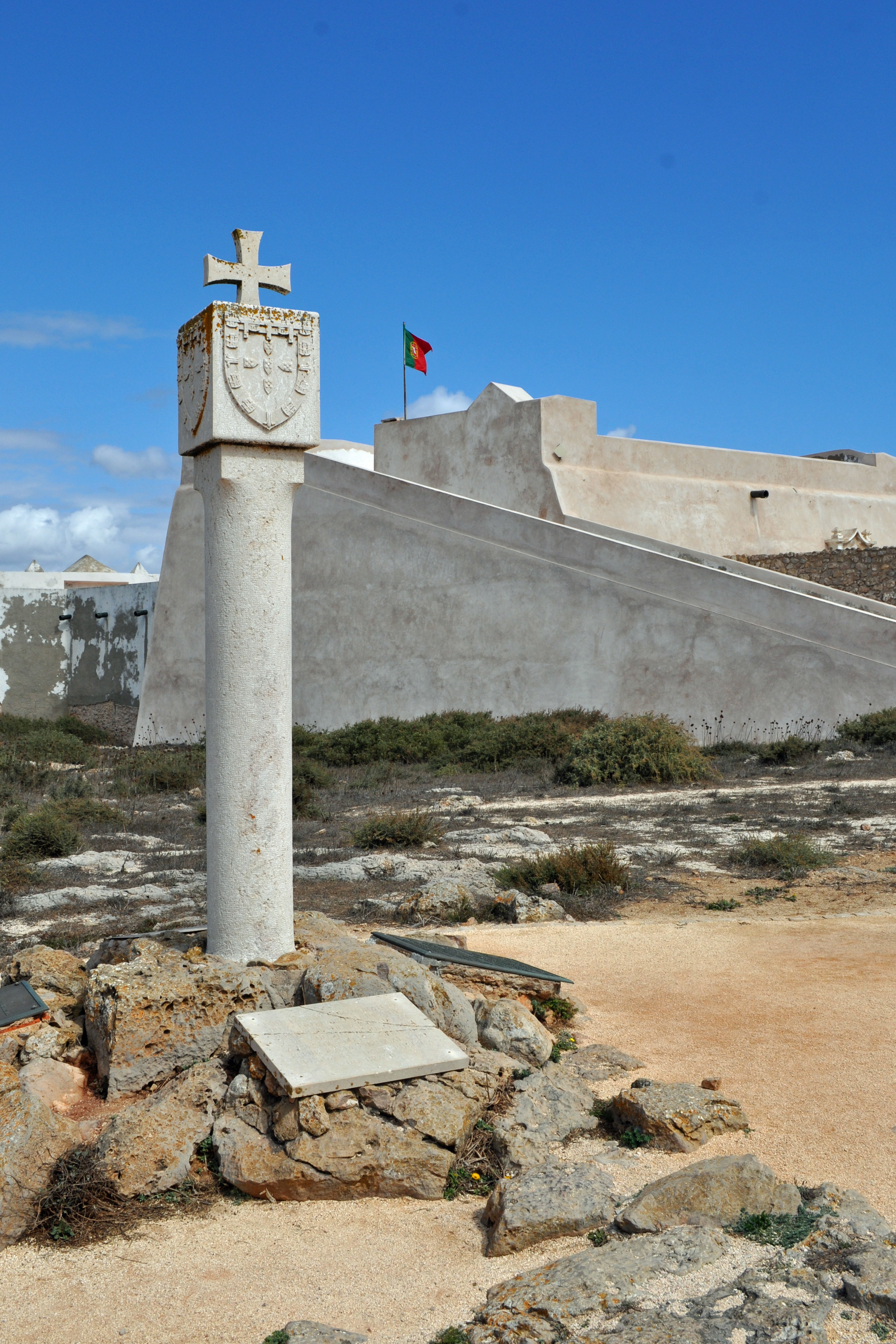 Fortaleza de Sagres (2012-09-25), by Klugschnacker in Wikipedia (56)